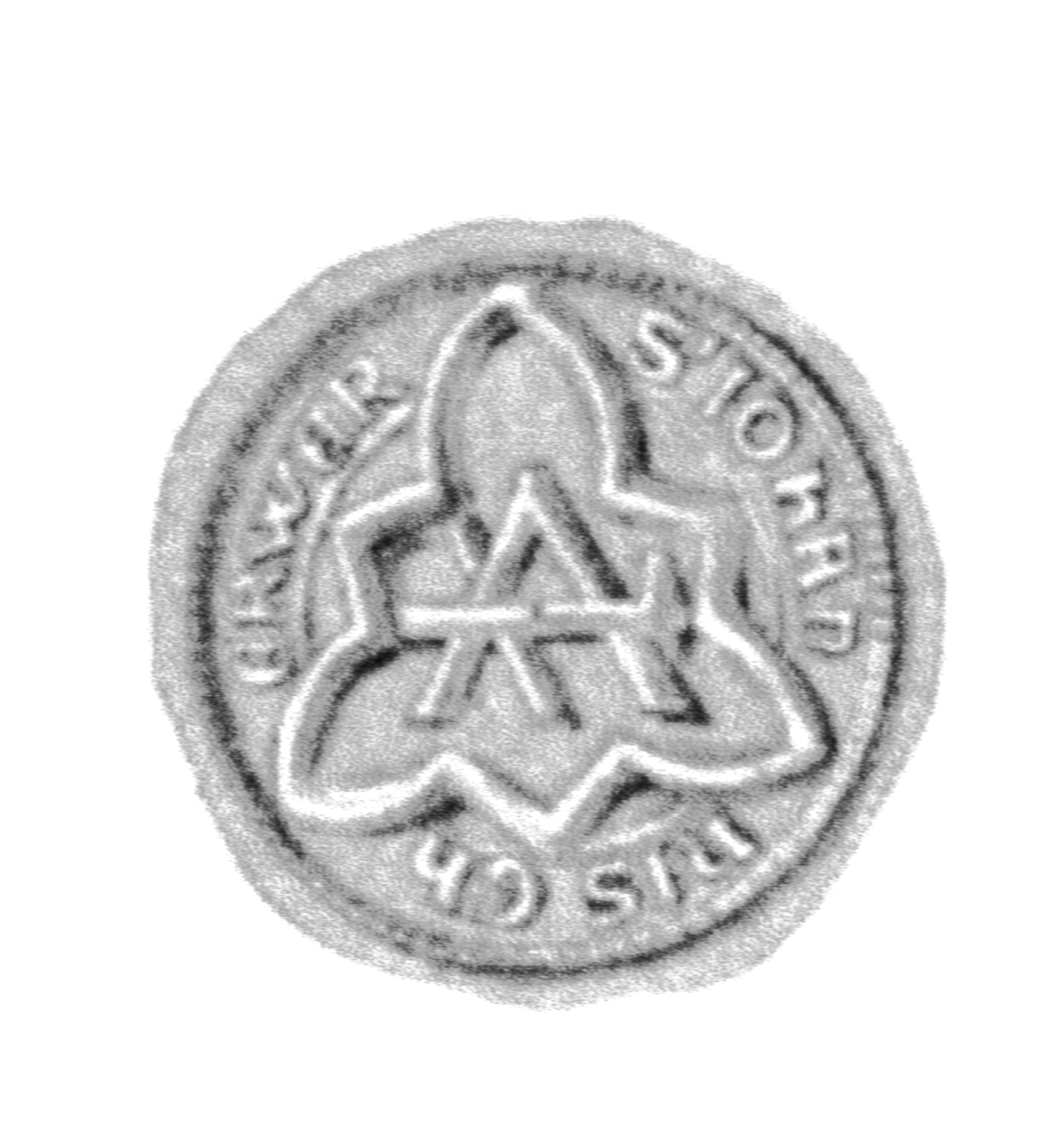 Siegel des Ratsmannes Johann(es) Gherwer. Das Siegel stammt aus der Zeit um 1442. Siehe Emil Ferdinand Fehling: Lübeckische Ratslinie, Nr. 503 (Johann Gerwer).